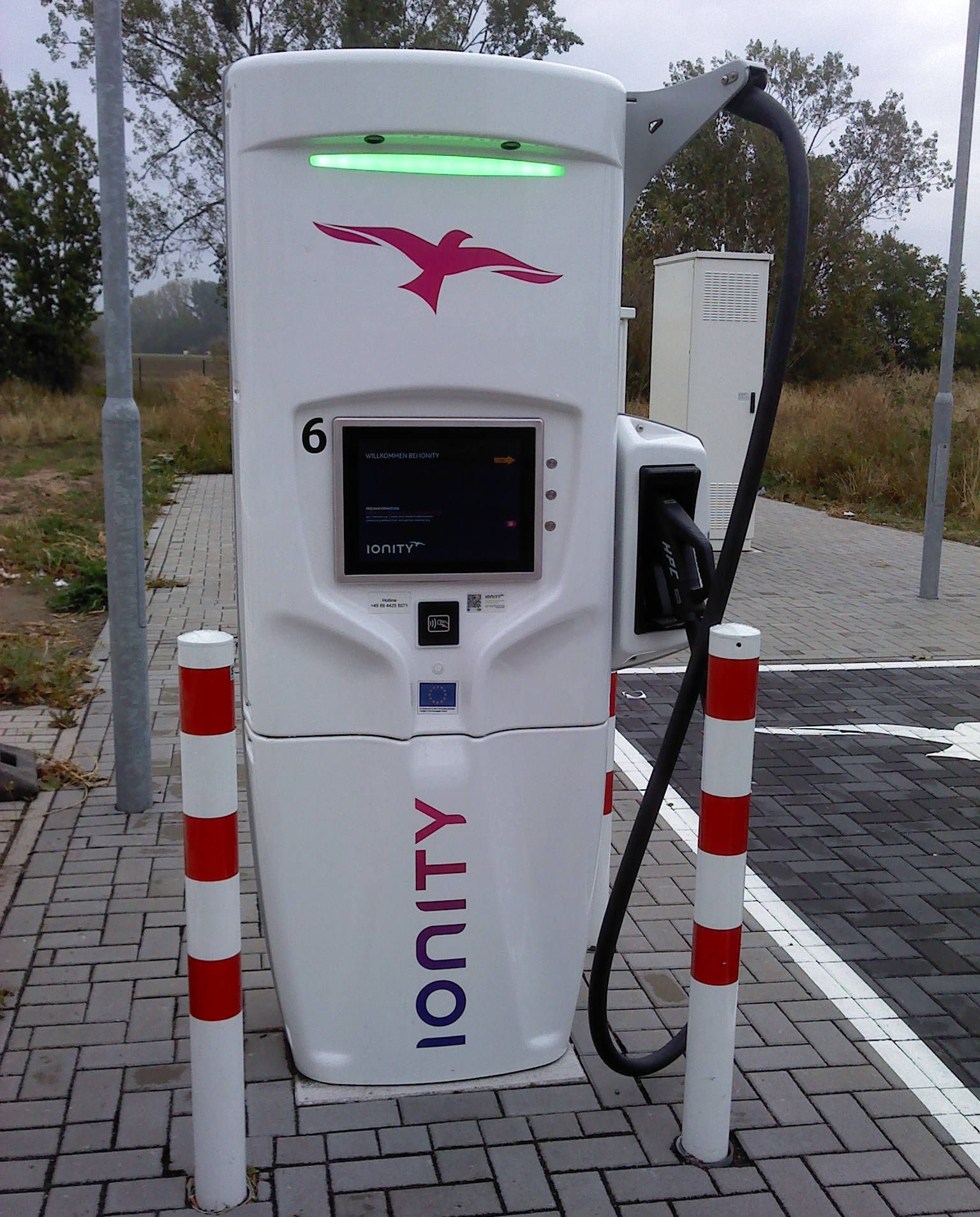 Ladesäule von Ionity